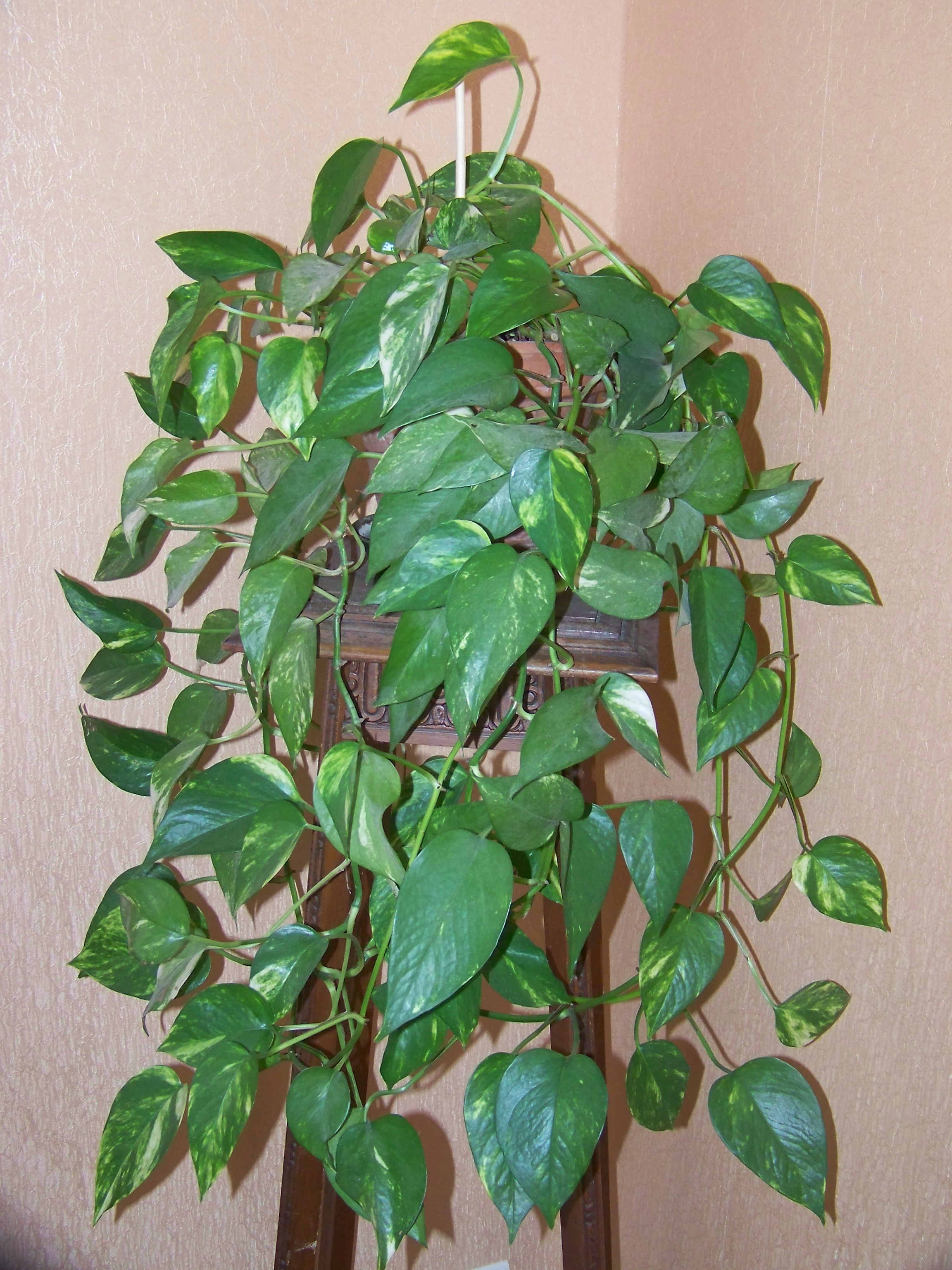 Epipremnum aureus. Synonymes : Scindapsus aureus, Rhaphidophora aurea, Pothos, Scindapsus doré, Liane du diable, Arum grimpant, etc.